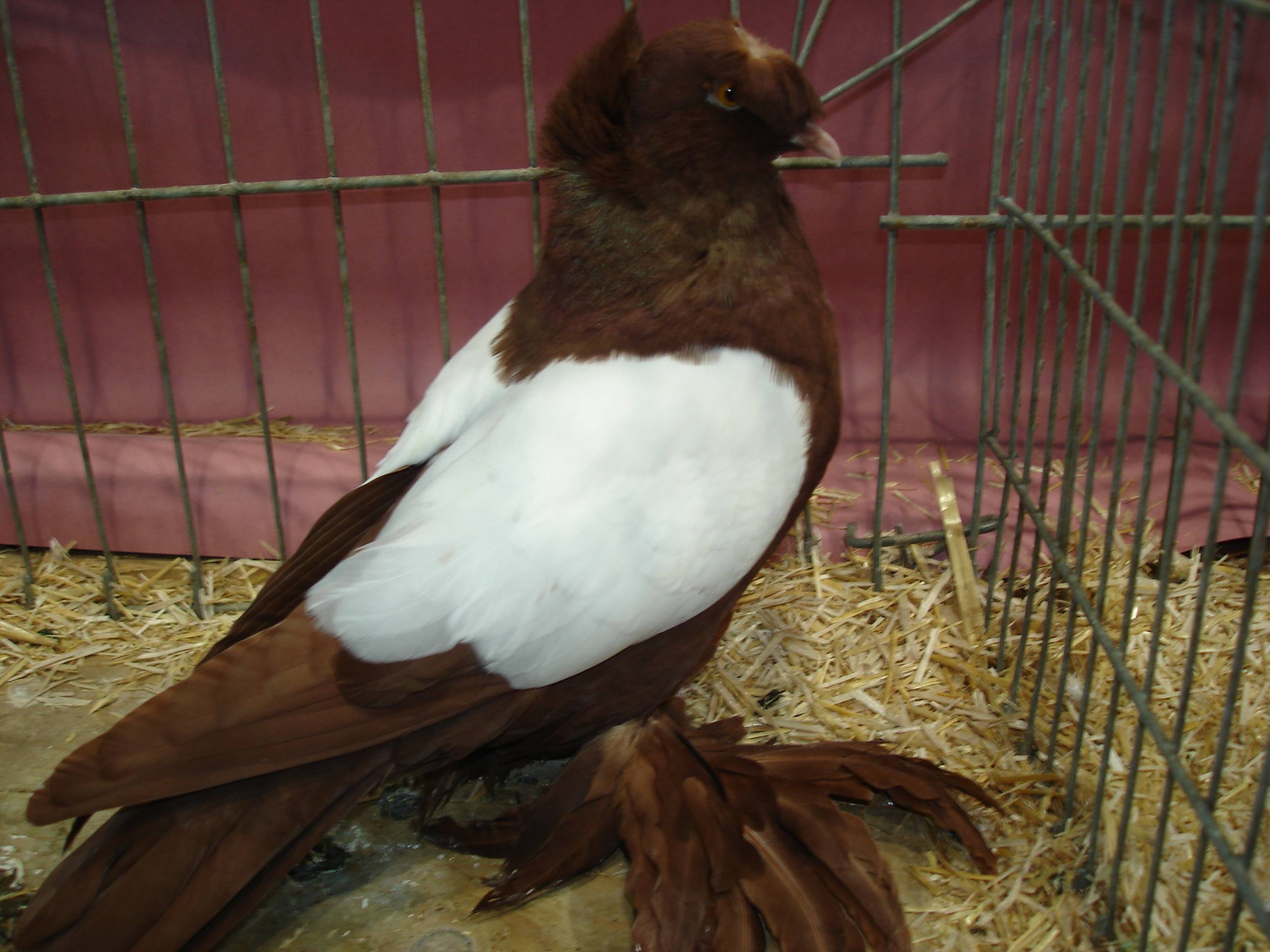 Zdjęcie turkota drezdeńskiego